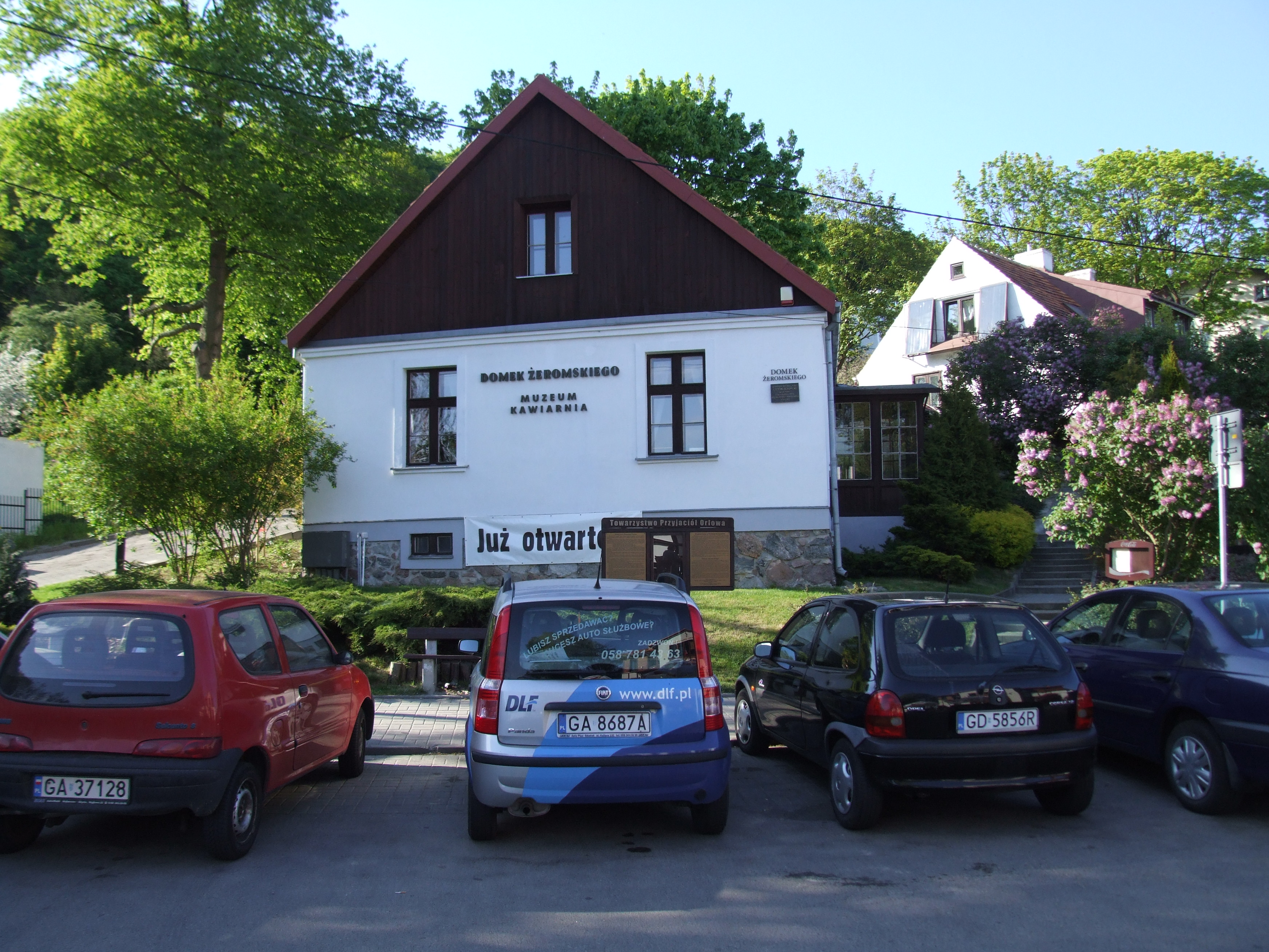 Domek Żeromskiego, kawiarnia i muzeum